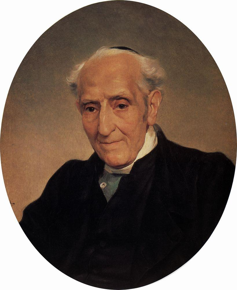 Портрет писателя и политического деятеля Тарентского архиепископа Джузеппе Капечалатро. 1833-1835